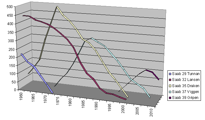 Svenska flygvapnet 1960-2010.